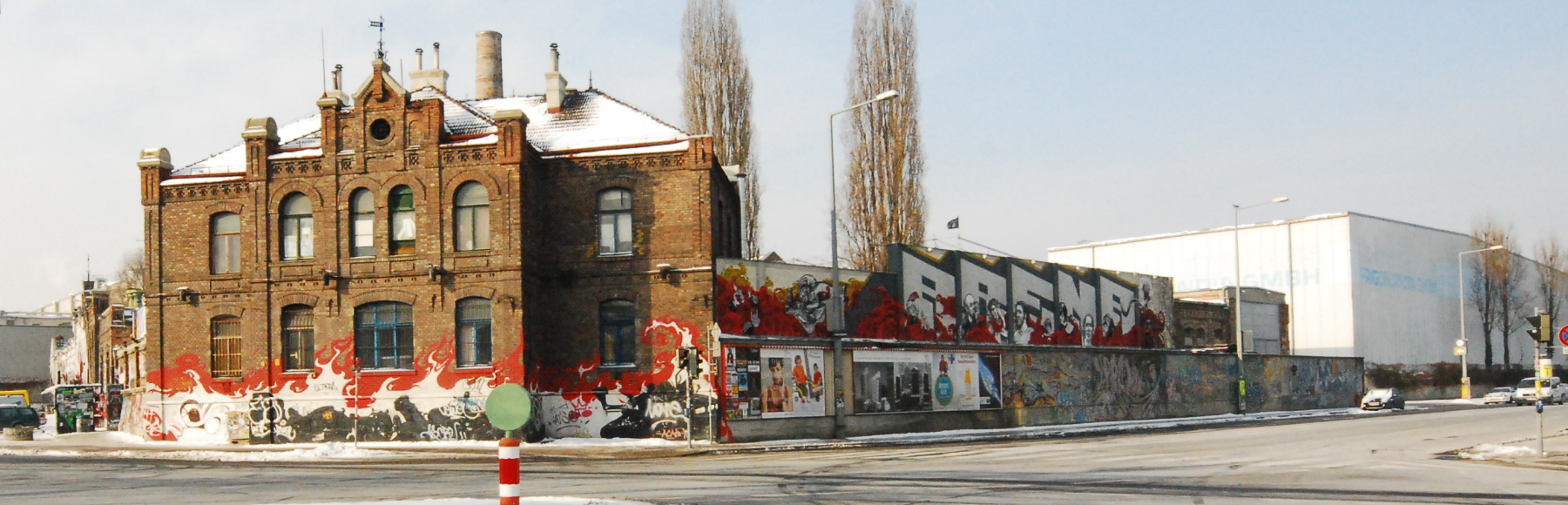 ehemaliger Schweineschlachthof in Sankt Marx (Wien)